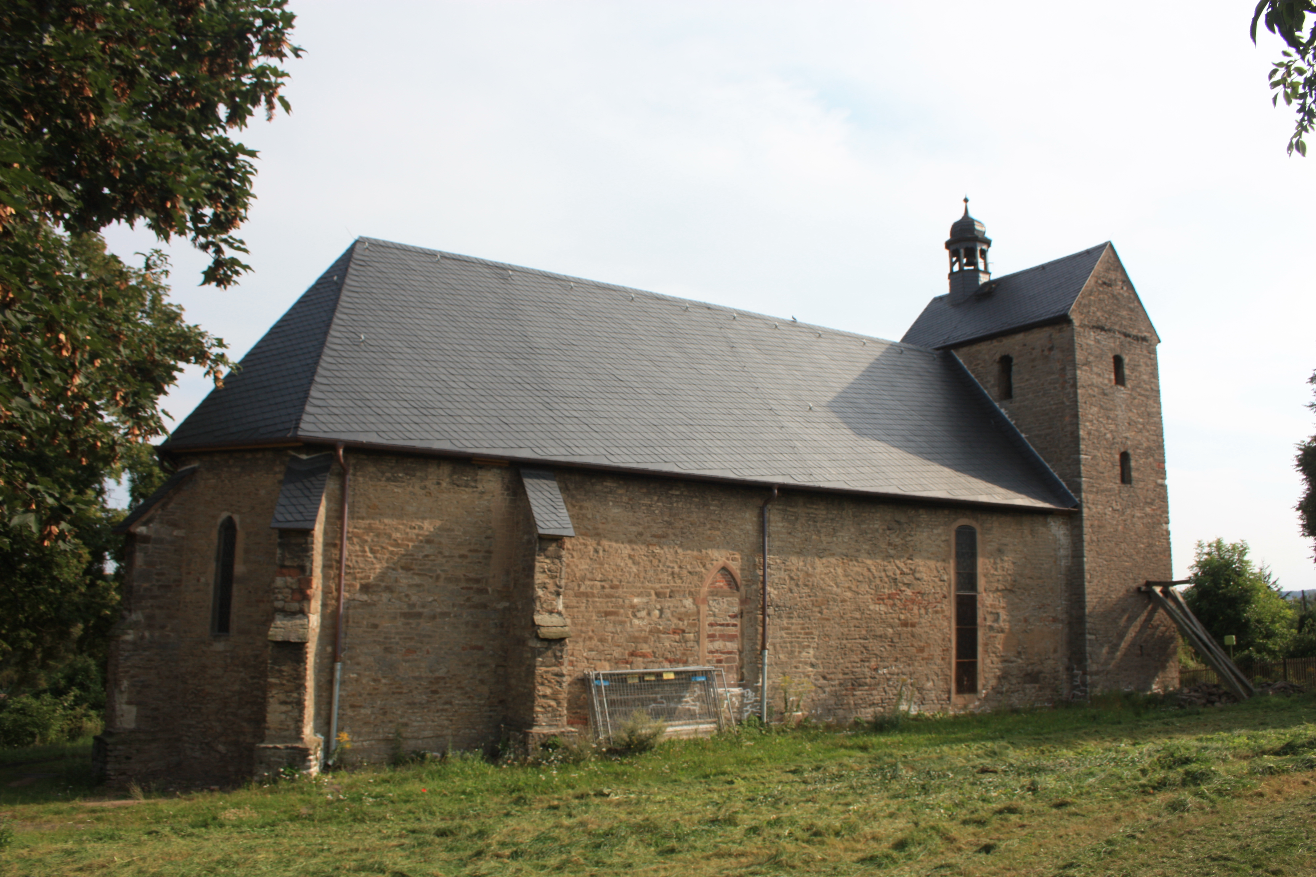 die Dorfkirche von Großörner